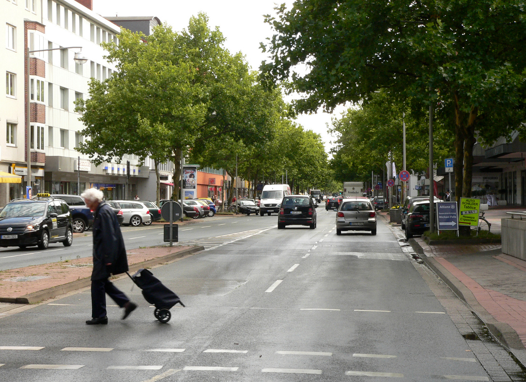 Hildesheimer Strasse in Hannover